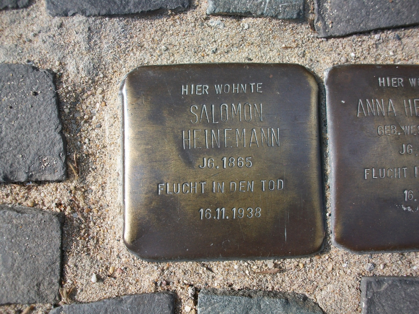 Stolperstein Solomon Heinemann